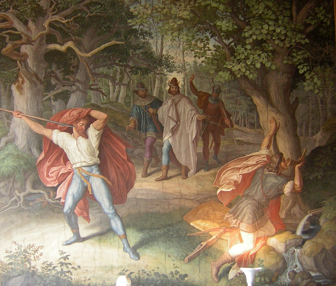 Hagen murdering Siegfried. Frescoe in the Nibelung Halls in Munich Germany